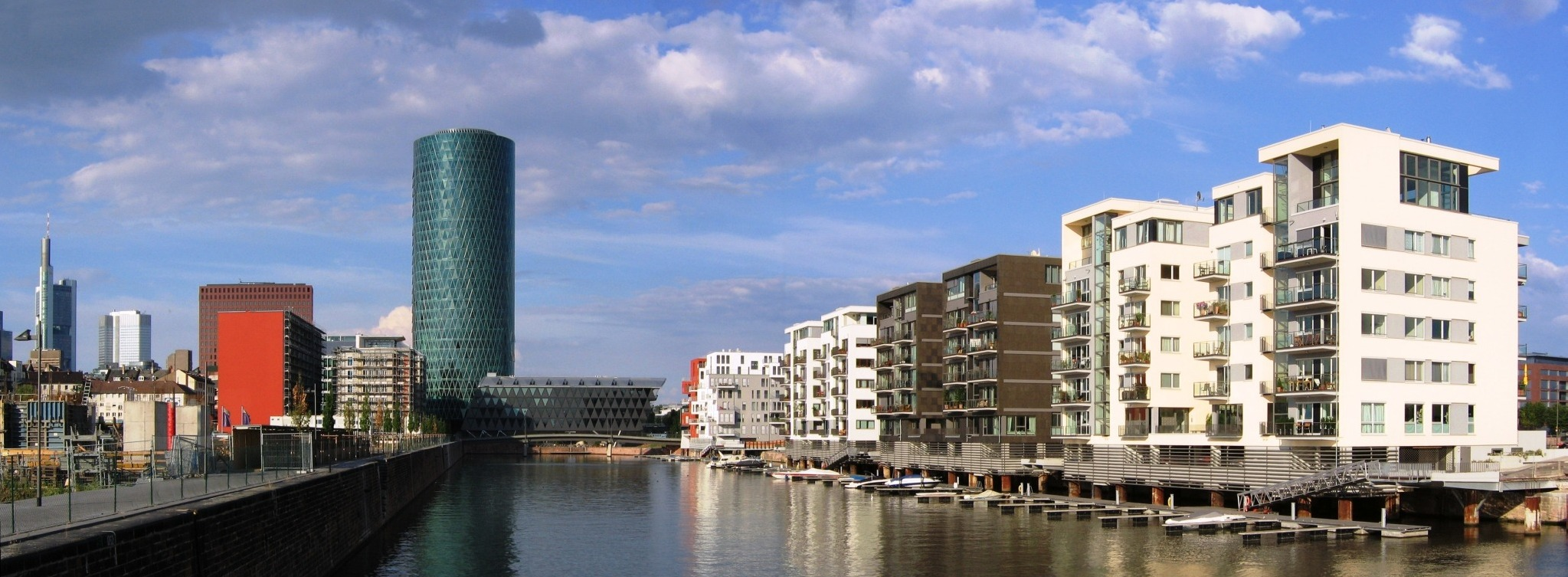 Frankfurter Westhafen 9.7.2005